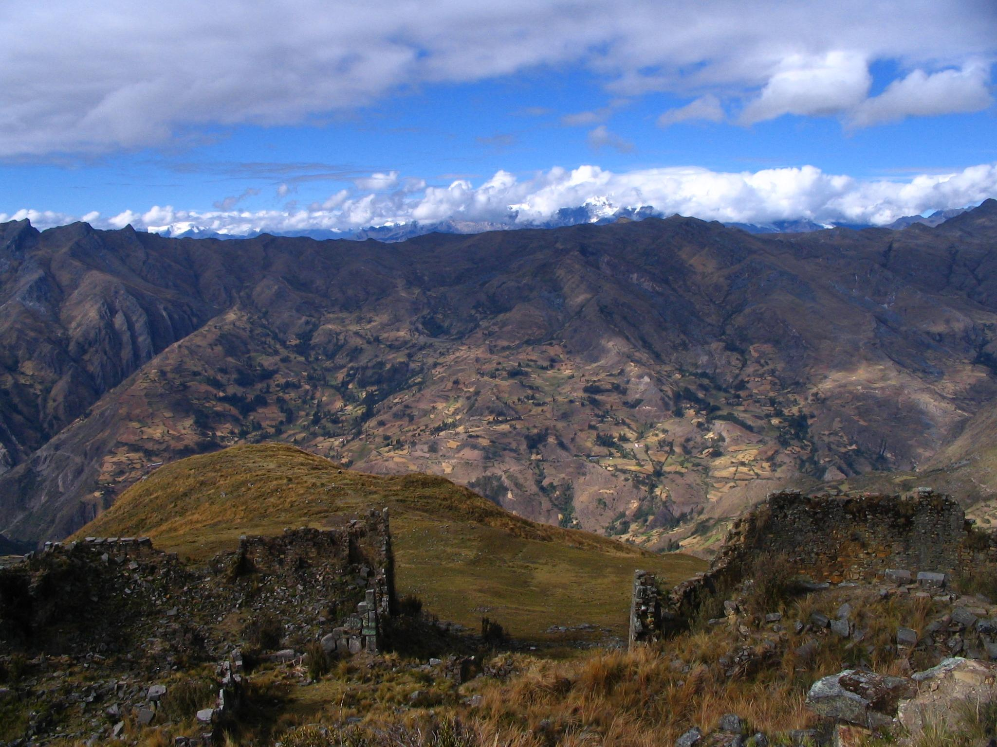 vista panorámica del claustro recinto mayor